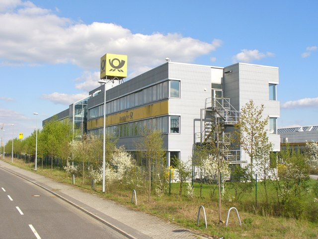 Stahnsdorf - Briefzentrum-Berlin-Suedwest (Berlin South-West Mail Centre)